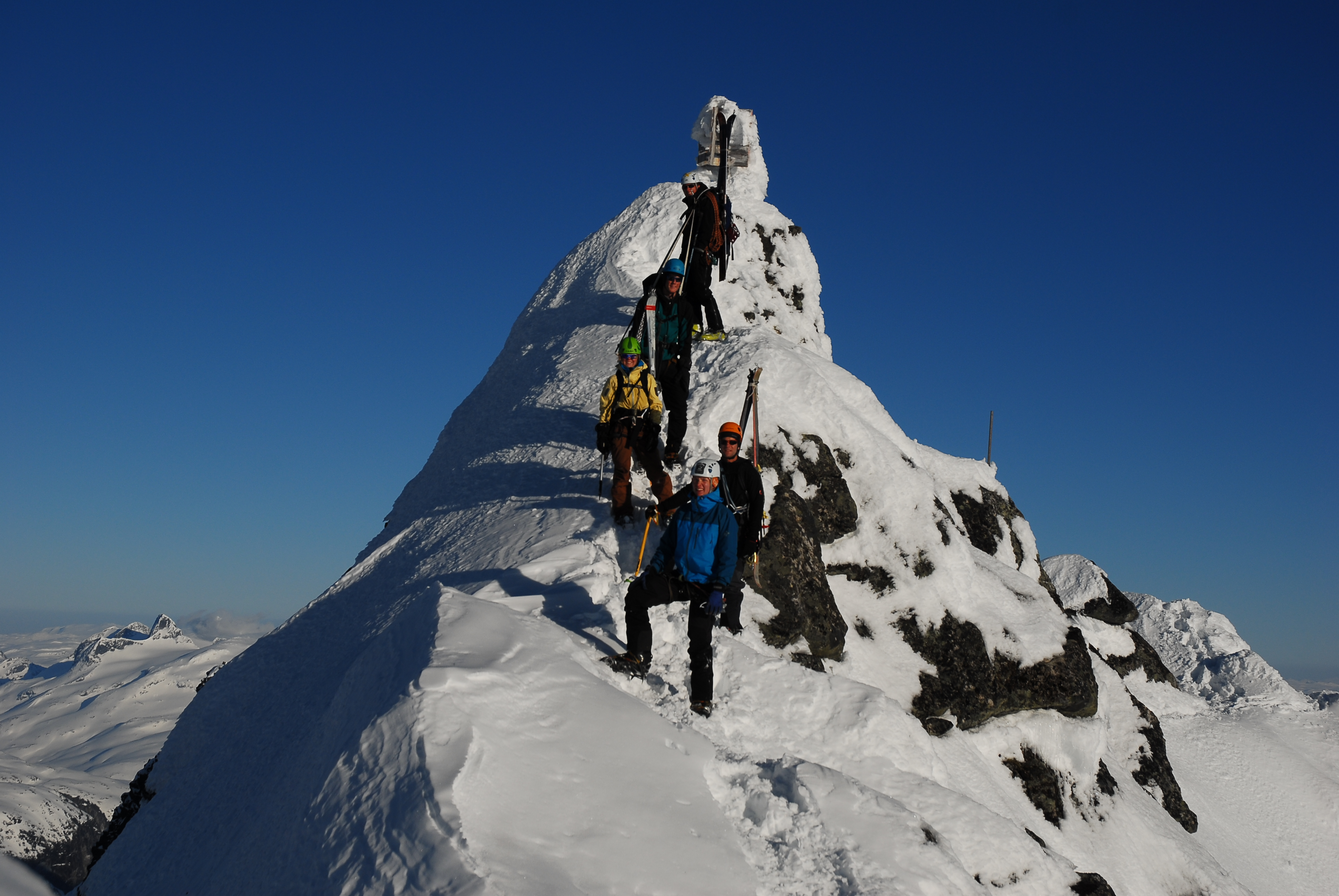 Toppen av Store Dyrhaugstind. Foto: Jon Olav Volden